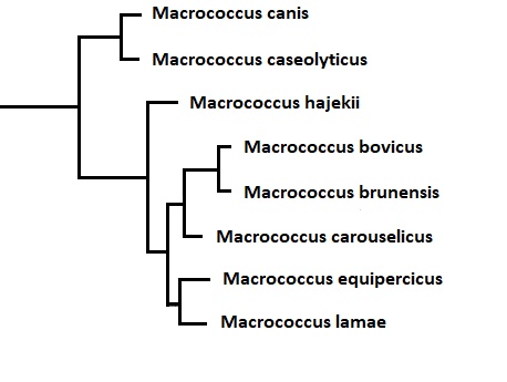 Phylogenie von Macroccoccus, Stand 2012